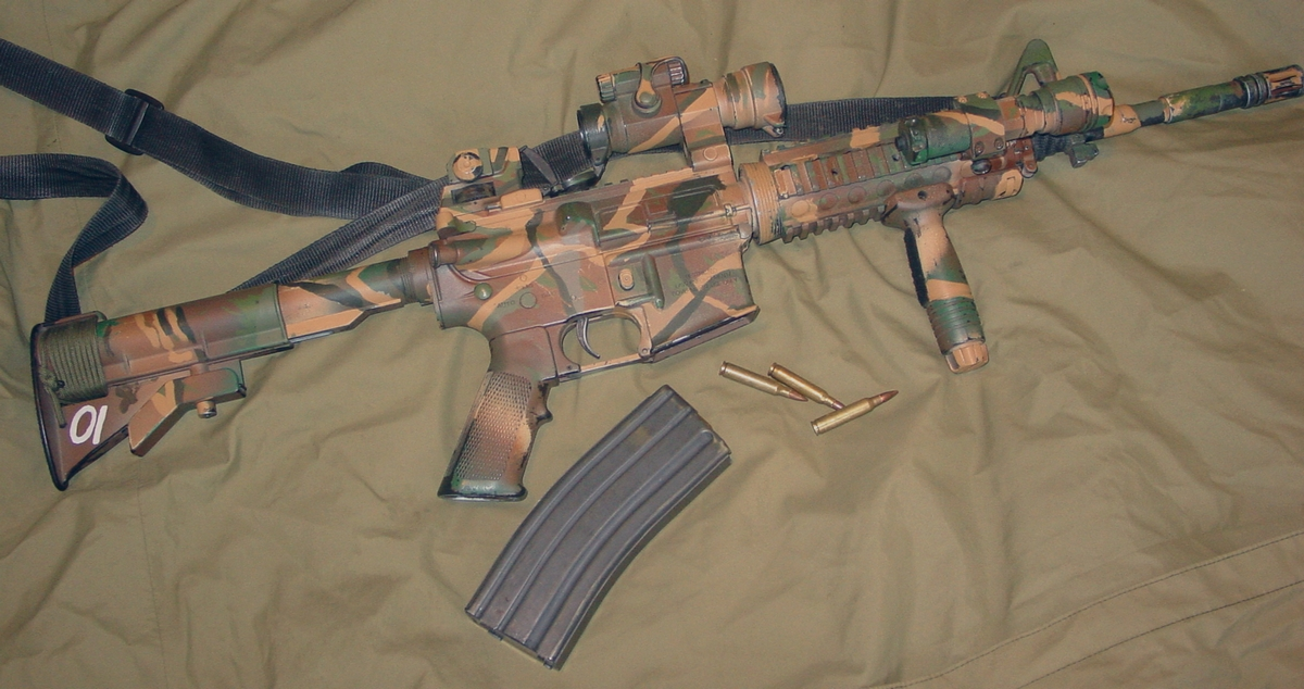 Fotka útočné pušky SOPMOD M4